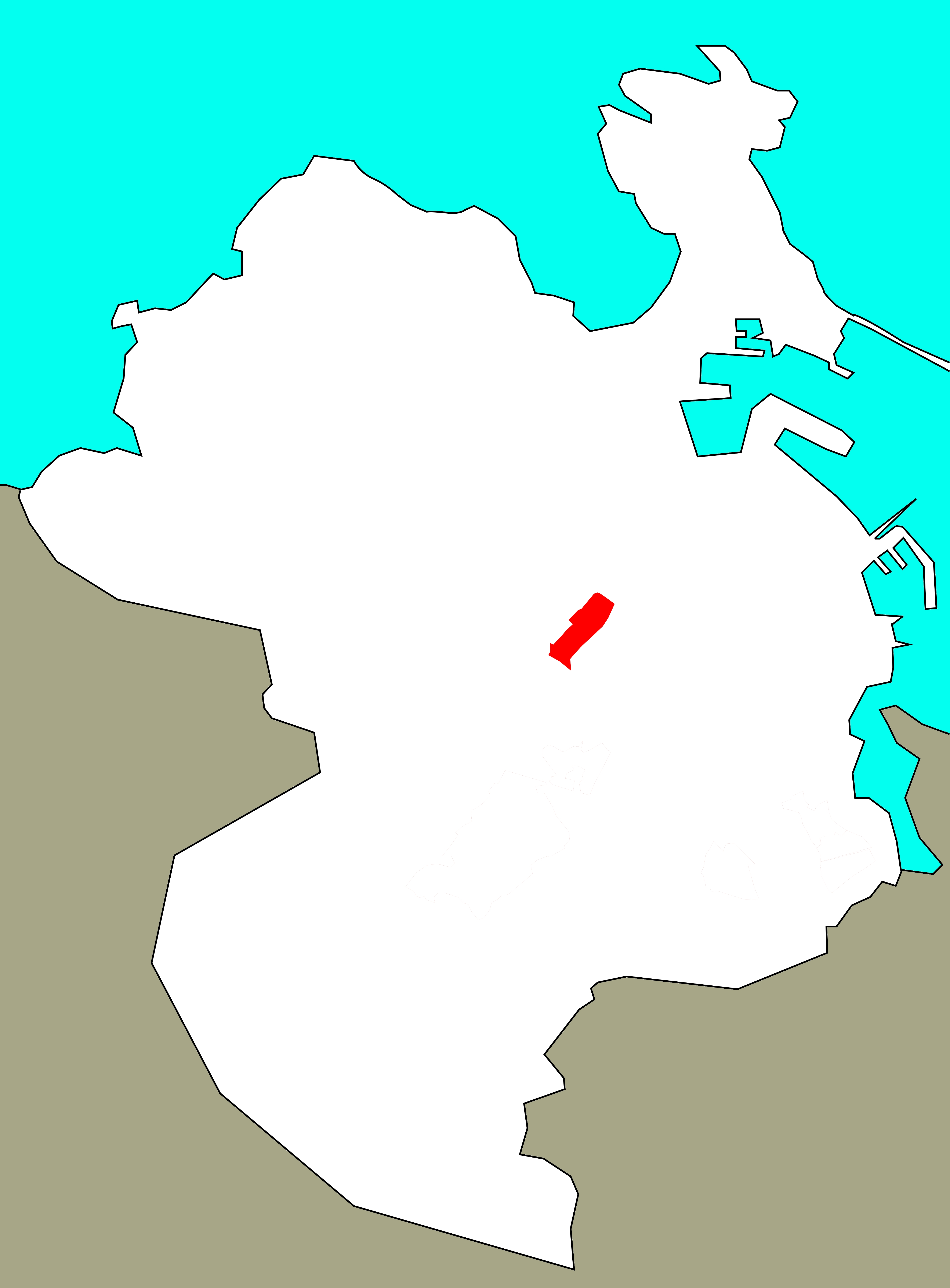 Situación de Lonzas no concello da Coruña.[1]